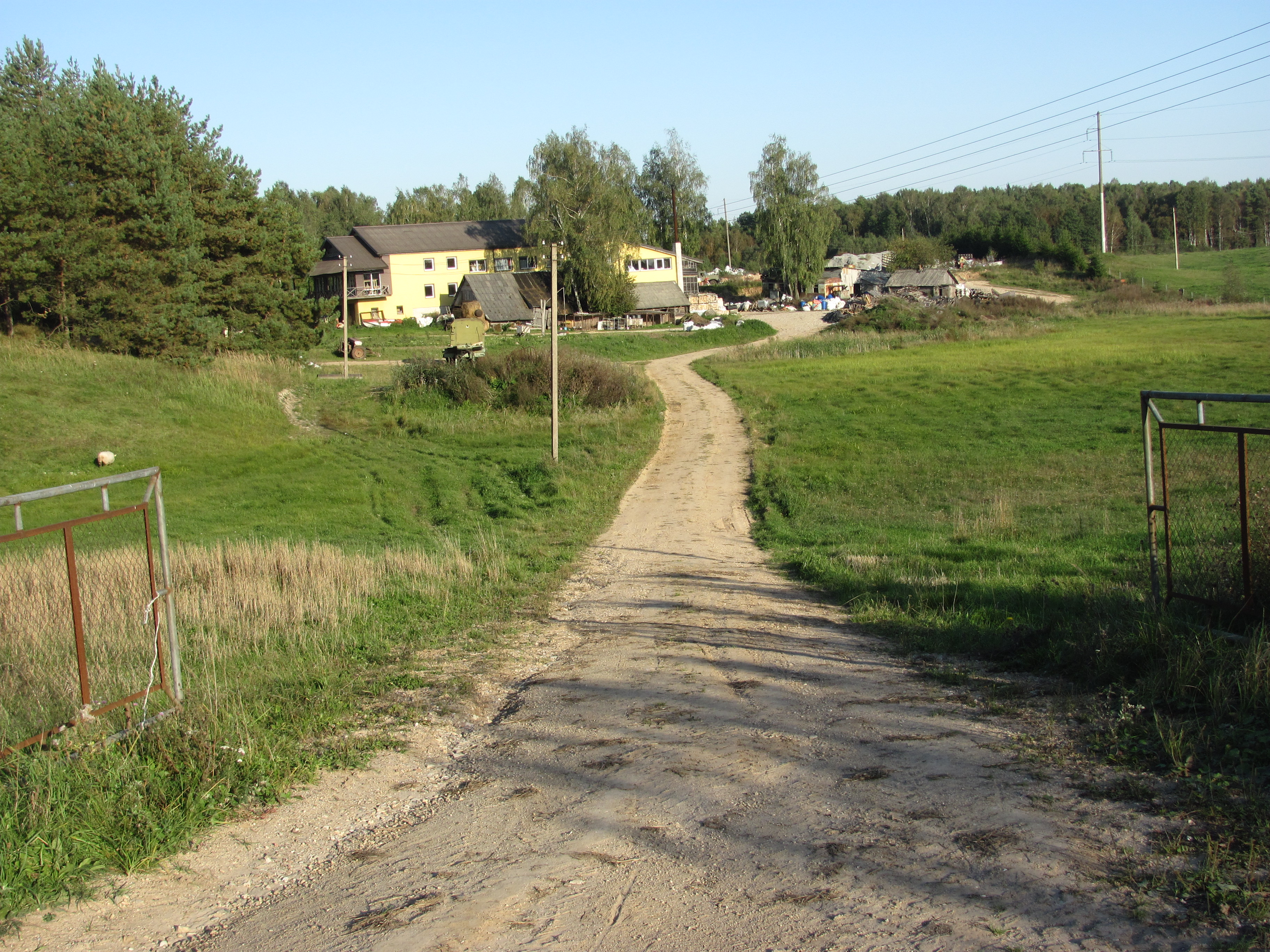 Utenos sen., Lithuania